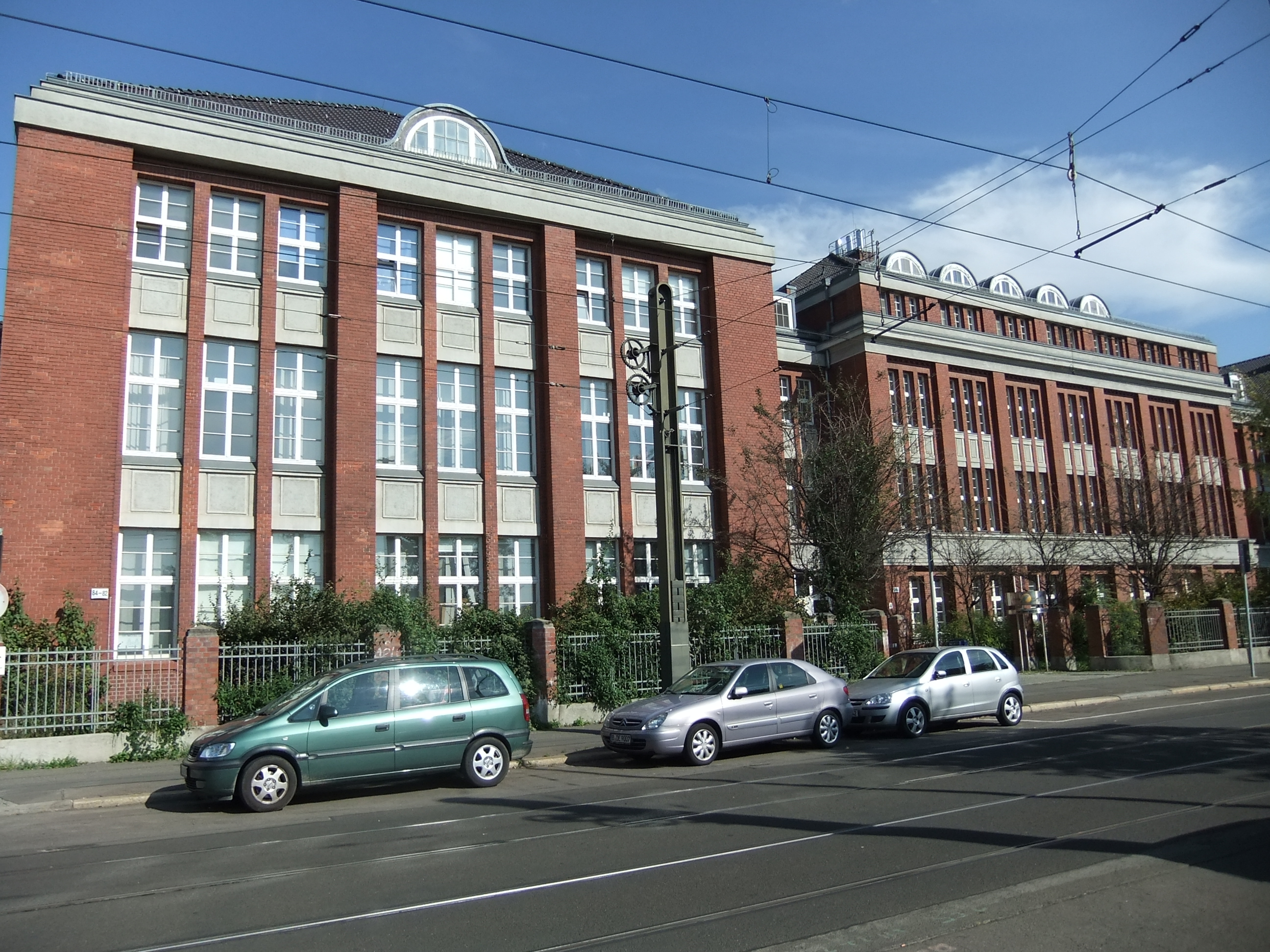 Denkmalliste Berlin 09040308 - Berlin Lichtenberg Herzbergstraße 82-84, AGA Automobilvertriebs-Gesellschaft m.b.H., 1916-19 von Bruno Buch (Baudenkmal)